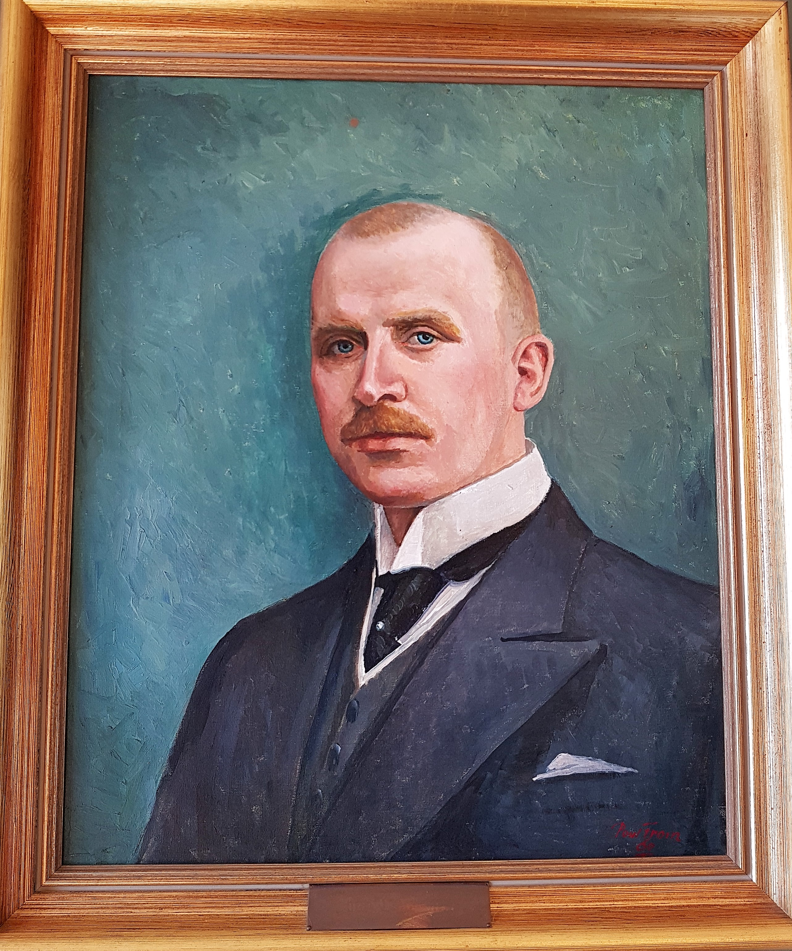 Bilde av portrett i Arendal gamle rådhus